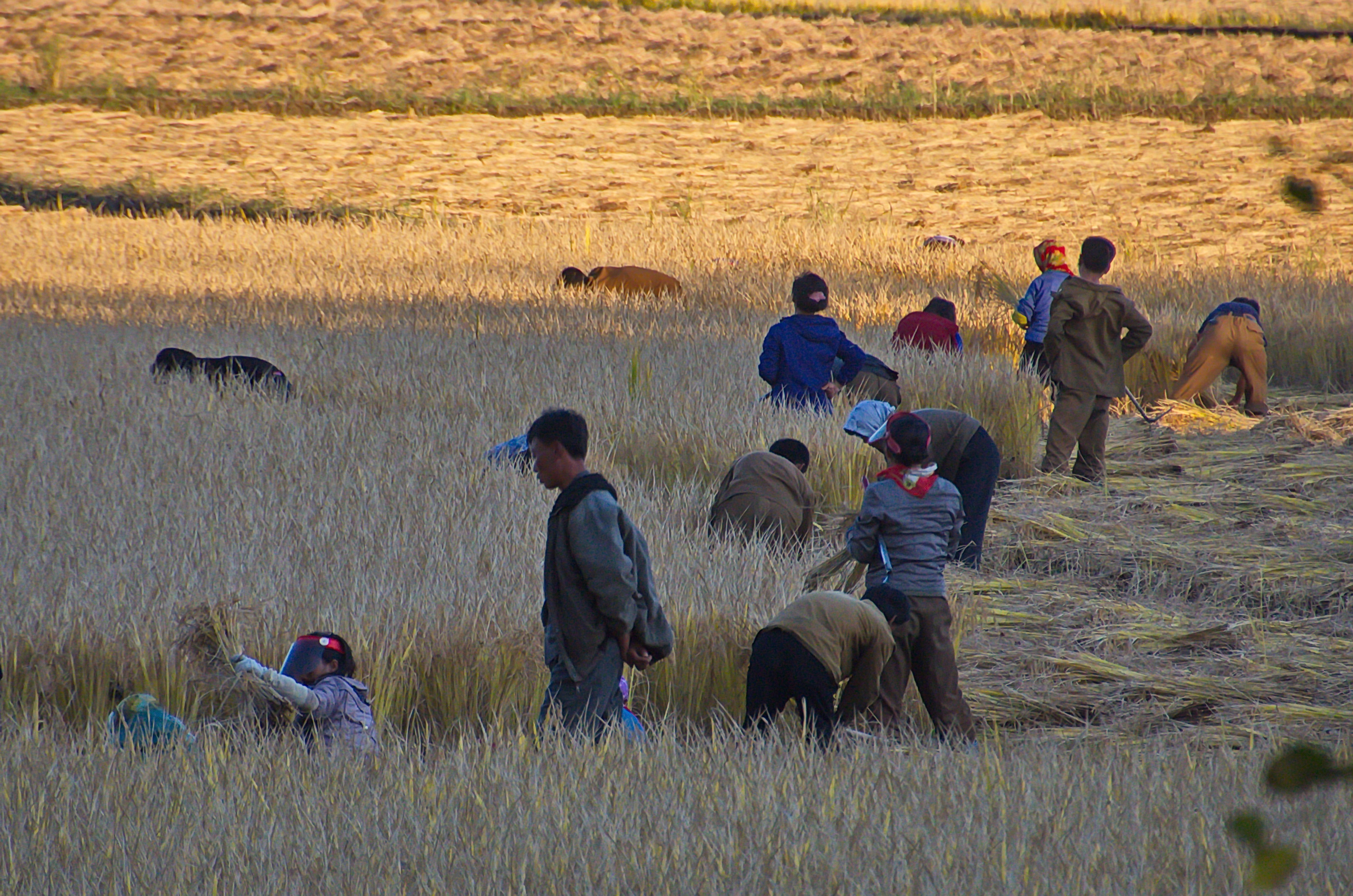 Nordkorea